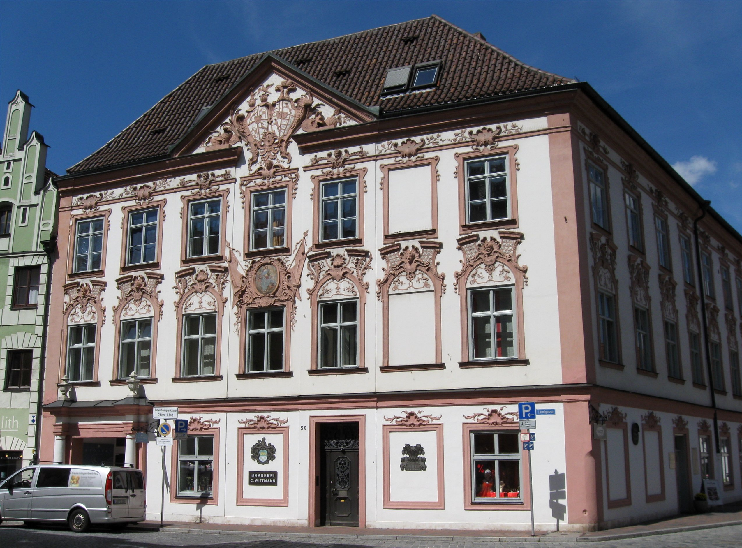 Ländgasse 50; Palais Etzdorf, stattlicher dreigeschossiger Walmdachbau in Ecklage mit reich stuckierter Fassade und Frontispiz, wahrscheinlich von Johann Baptist Zimmermann, Mitte 18. Jahrhundert